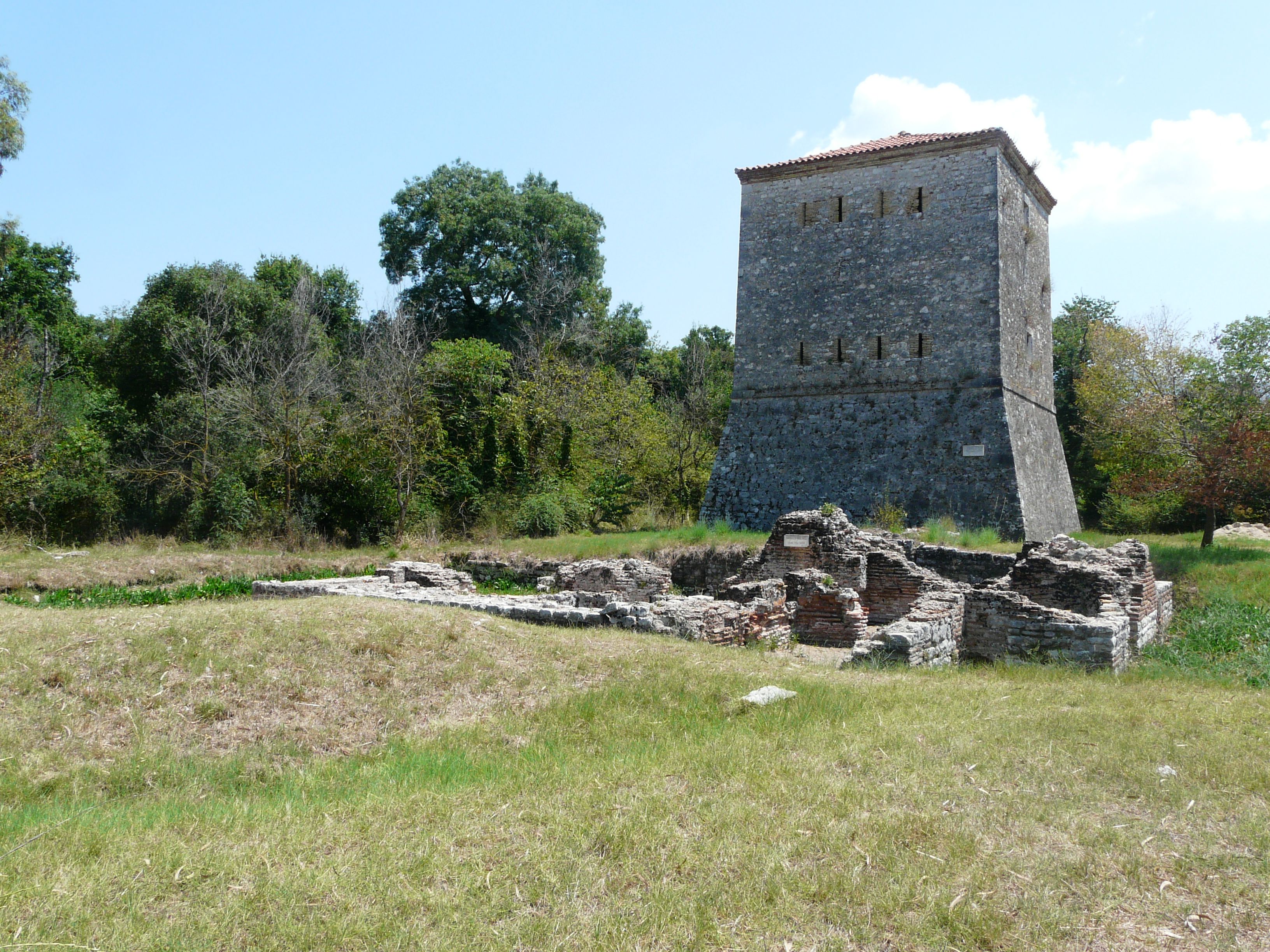 Butrint: Venetian Tower.